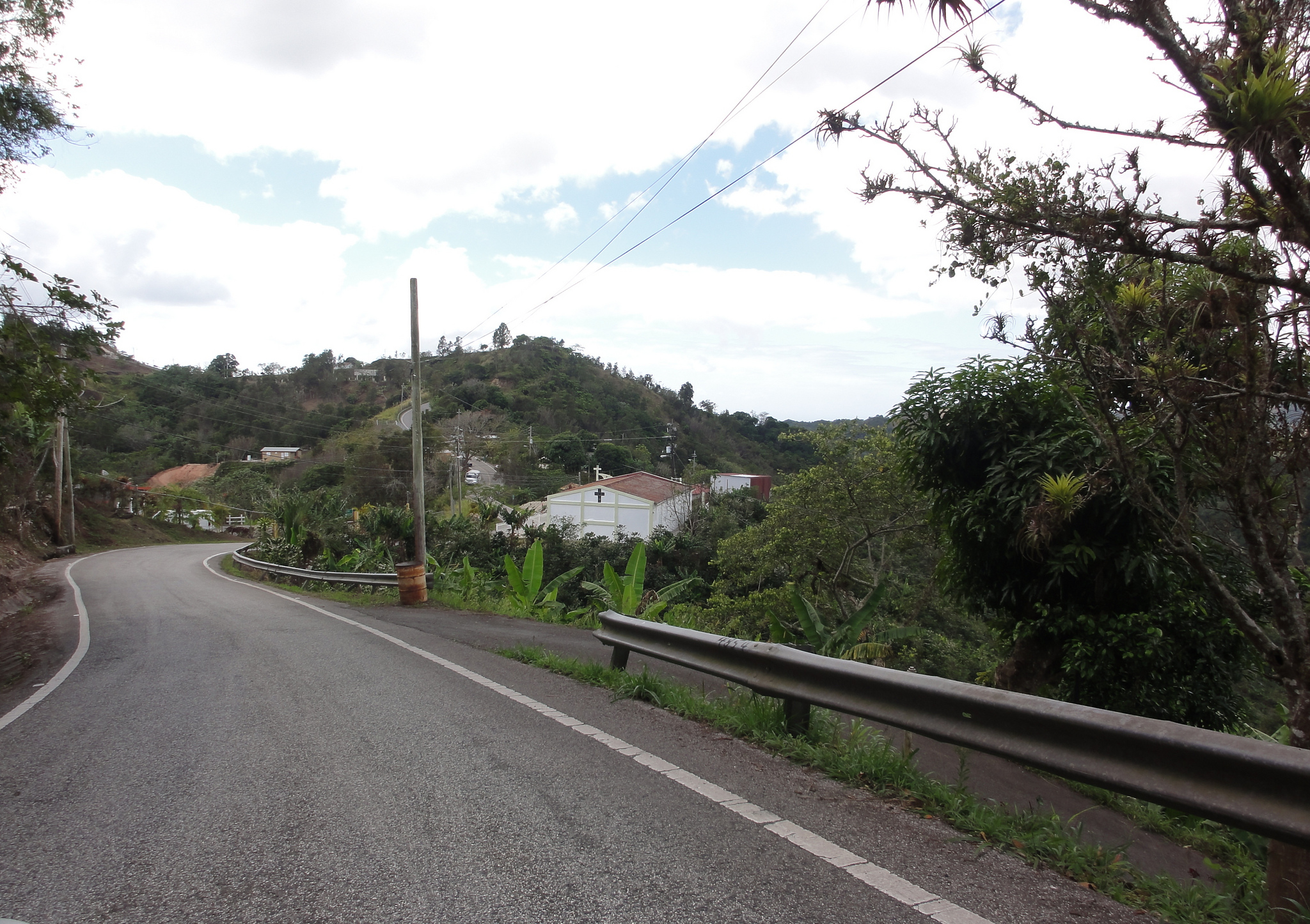 A residential sector in Barrio Montes Llanos, Ponce, Puerto Rico